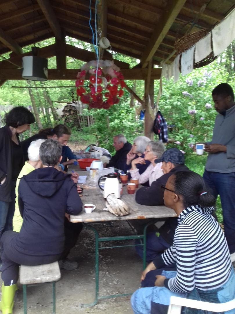 Jardinage collectif, le temps d'accueil du matin (jardinons ensemble)